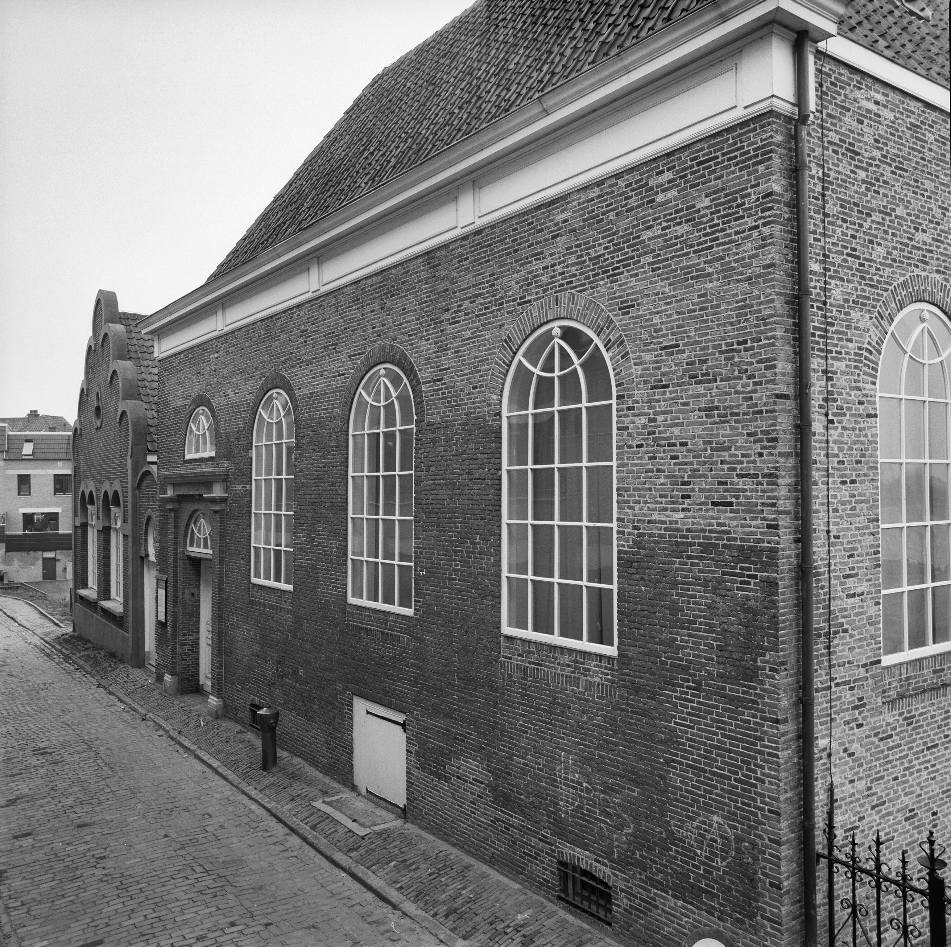 voormalige Synagoge: voorgevel